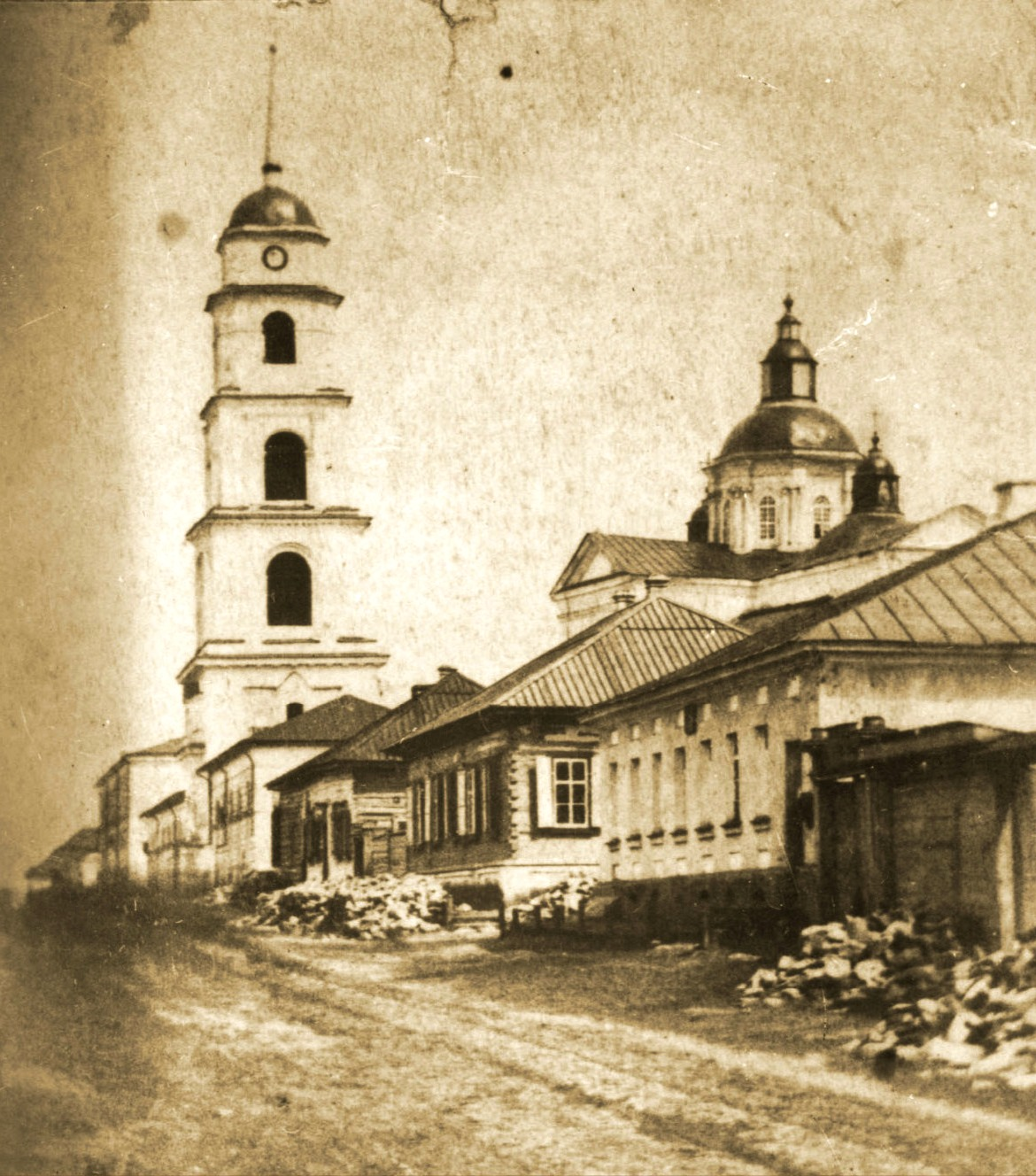 Дзвіниця Троїцького собору (західний фасад - від Київської брами)